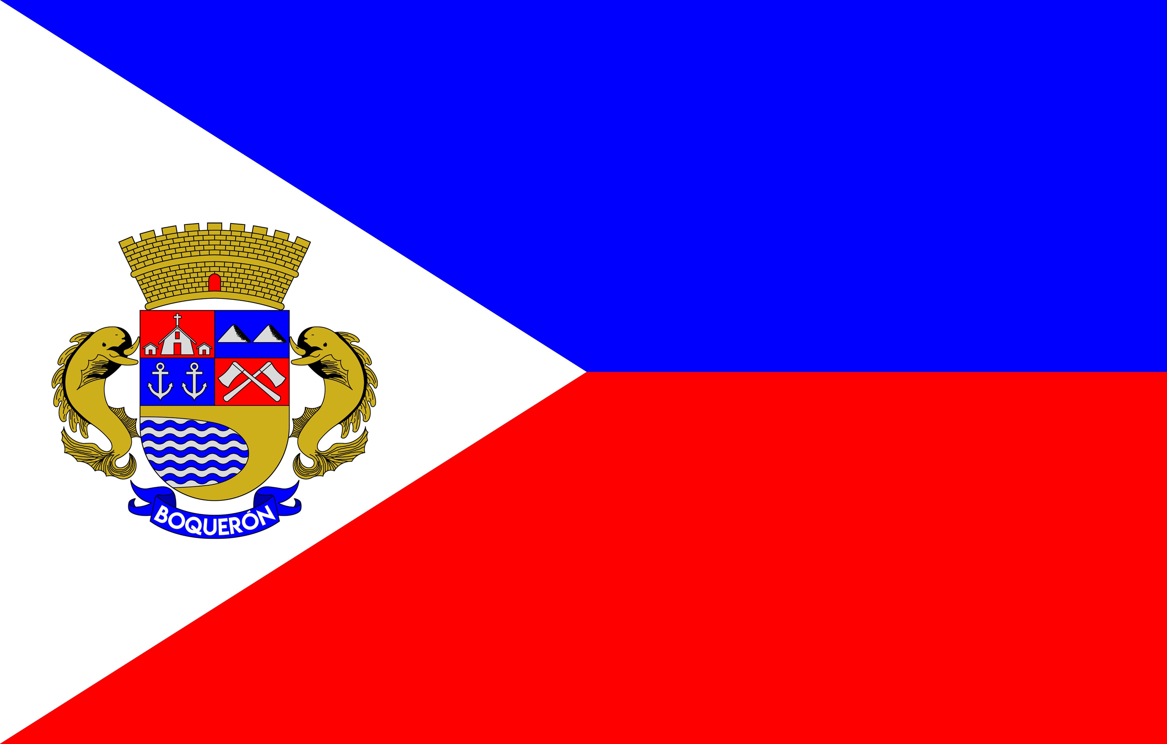 Bandera de Boquerón